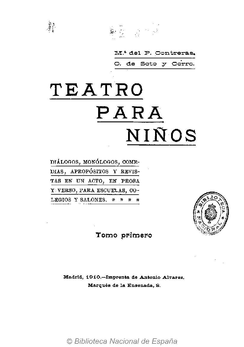 Teatro para niños : diálogos, monólogos, comedias, apropósitos y revistas en un acto, en prosa y verso, para escuelas, colegios y salones Mª del P. Contreras, C. de Soto y Corro Autoras: Contreras de Rodríguez, María del Pilar (1861-1930) ; Soto y Corro, Carolina de Fecha: entre 1910 y 1917 Datos de edición: Madrid. Imp. de Antonio Álvarez